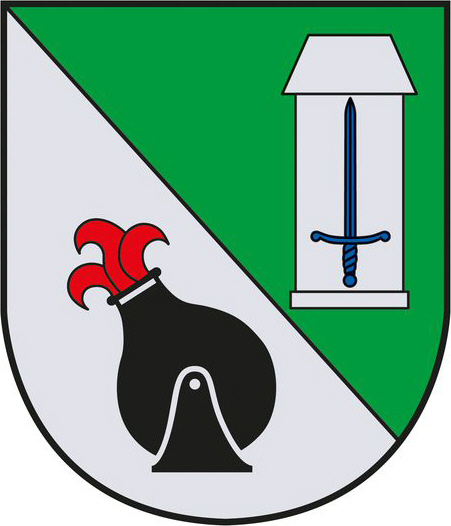 Im neuen Gemeindewappen wurden die Darstellungen der beiden bisherigen Wappen der Altgemeinden Predlitz-Turrach und Stadl an der Mur im Wesentlichen übernommen und somit ein optimal gelungenes „Symbol der Zusammengehörigkeit“ geschaffen.